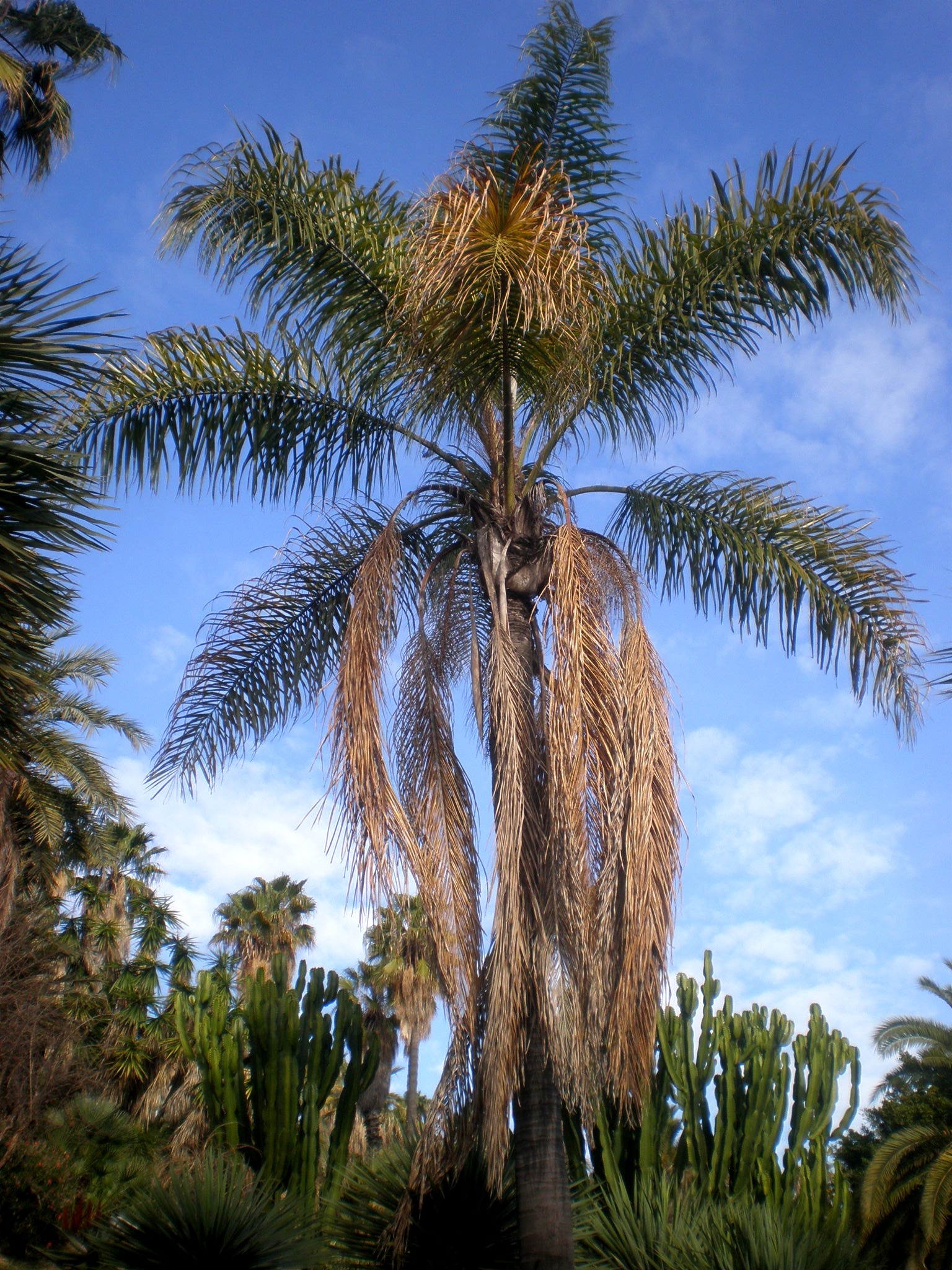 Jardín Botánico de Barcelona.